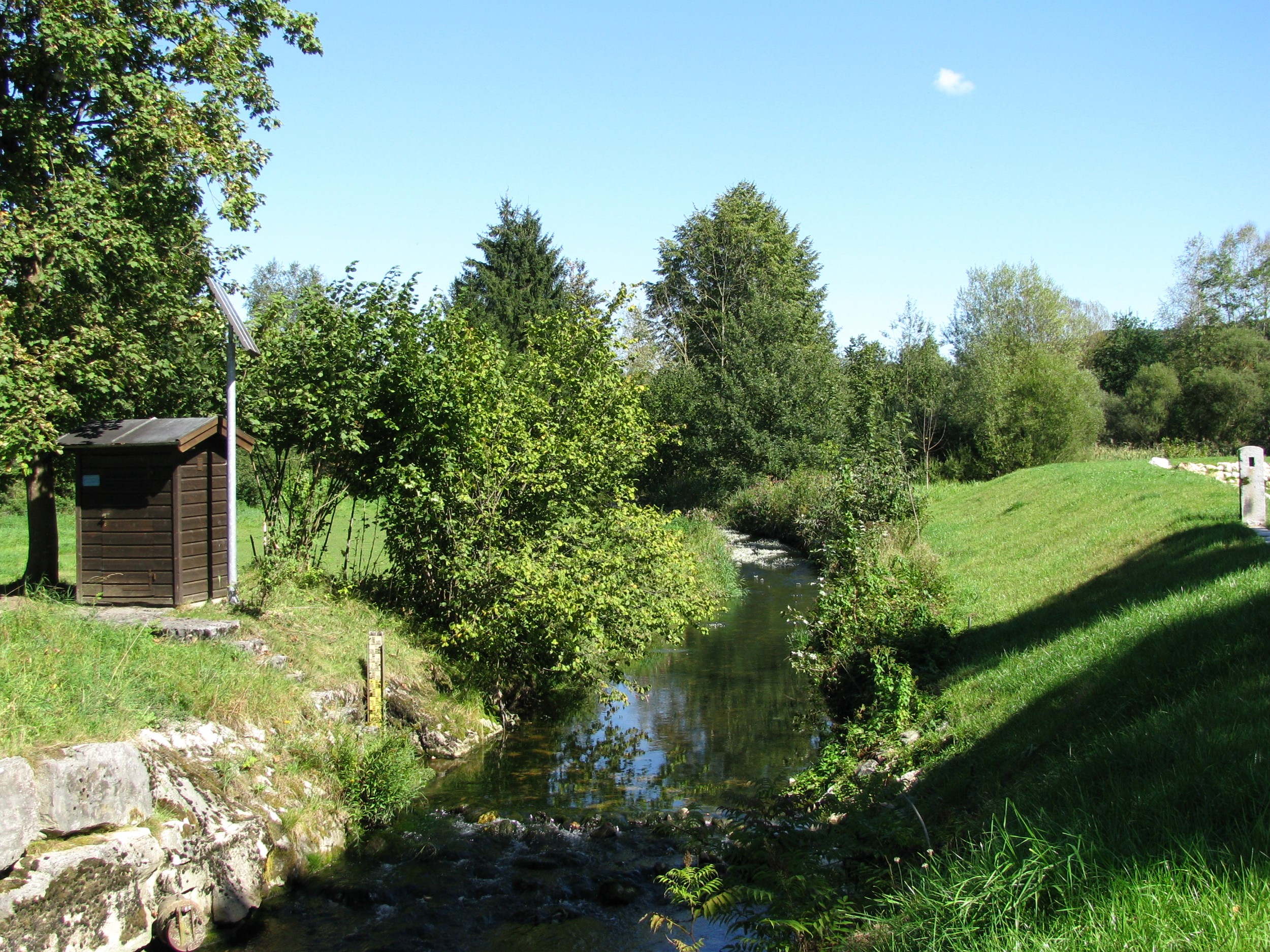 Zeller Bach bei Bairawies, mit Pegelmessstation des HND Bayern